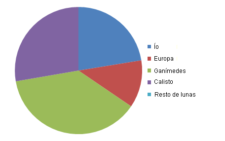 Gráfico de sectores de las masas de las lunas de Júpiter. Las pequeñas lunas ni siquiera aparecen.